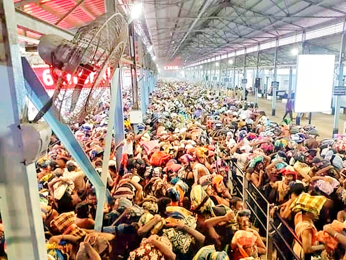 శబరిమలైలో దర్శనానికి వేచిఉన్న భక్తులు.